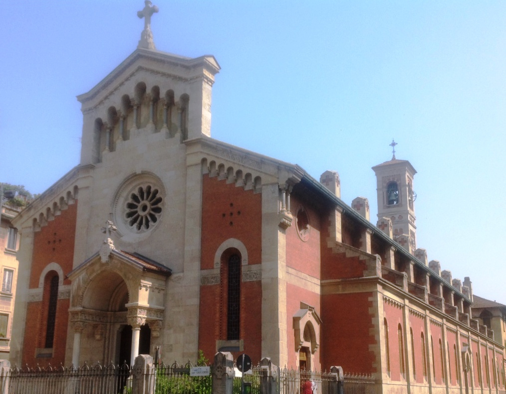 Veduta esterna della chiesa di San Gregorio Magno a Milano.